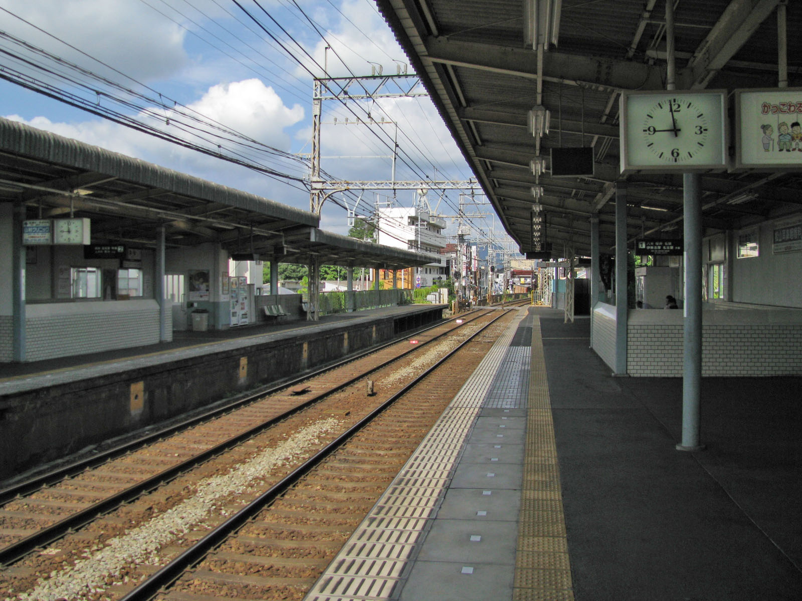 近鉄真菅駅